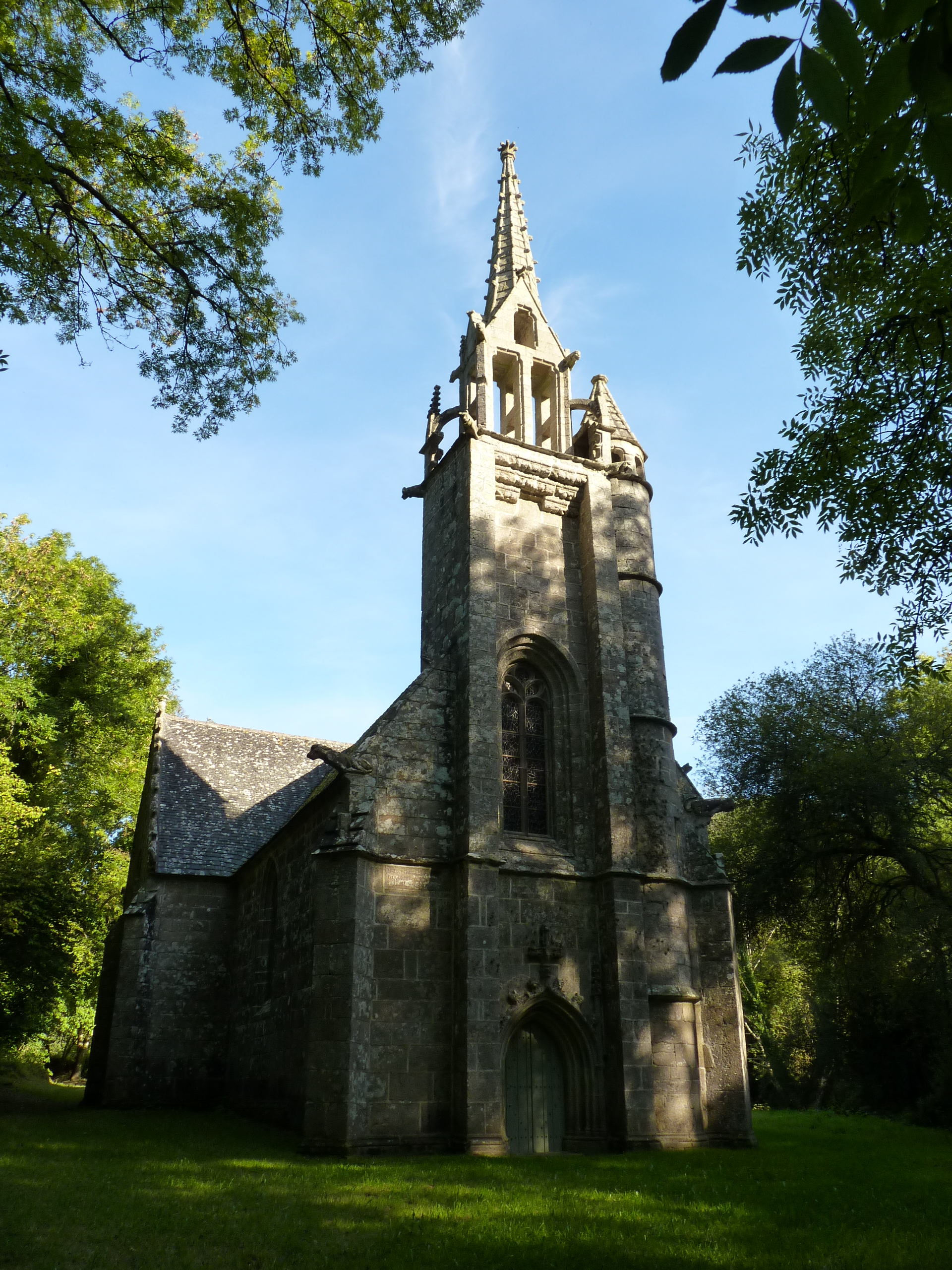 Chapelle du 15ème siècle entre Plufur et Trémel.